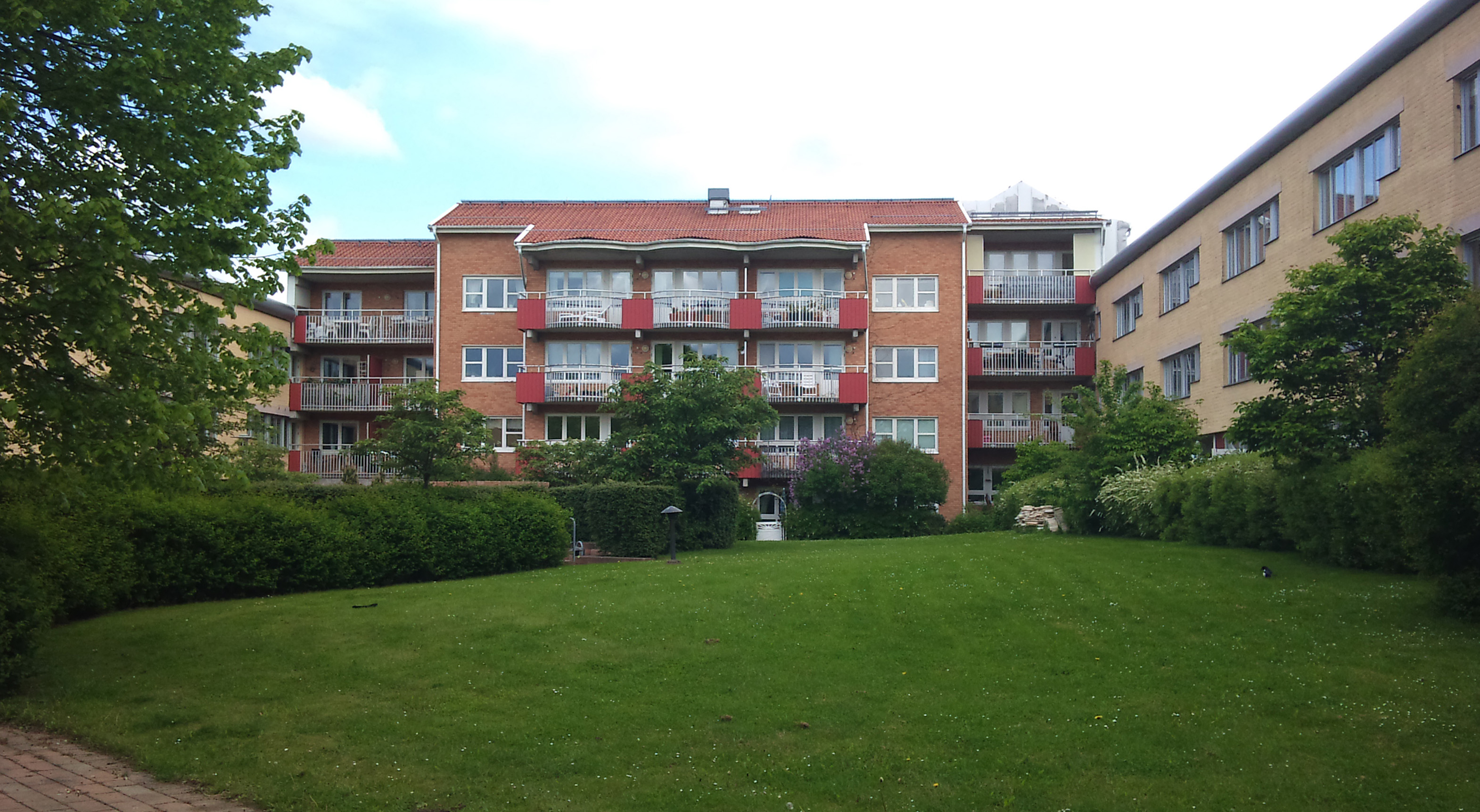 Hus i Möllevången i Lund